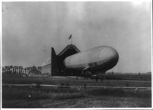 LZ11 Viktoria Louise